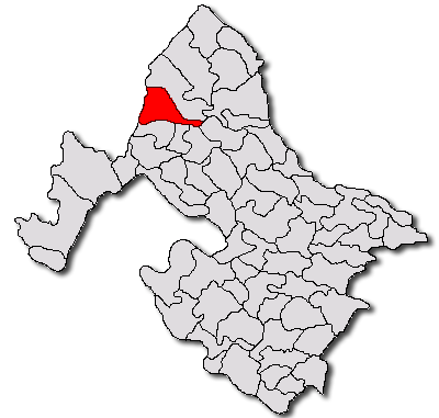 Categorie:Hărţi ale judeţului Mehedinţi